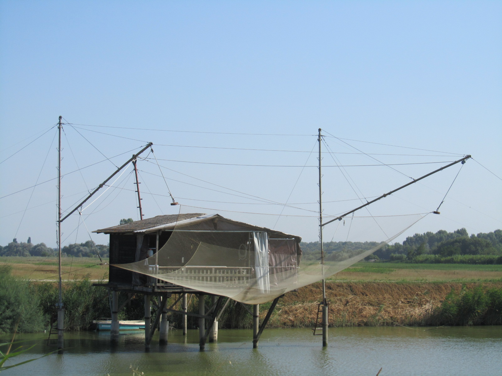 Bilancione da pesca in Pineta di Classe, Classe/Ravenna, "Parco regionale del Delta del Po (Emilia-Romagna)